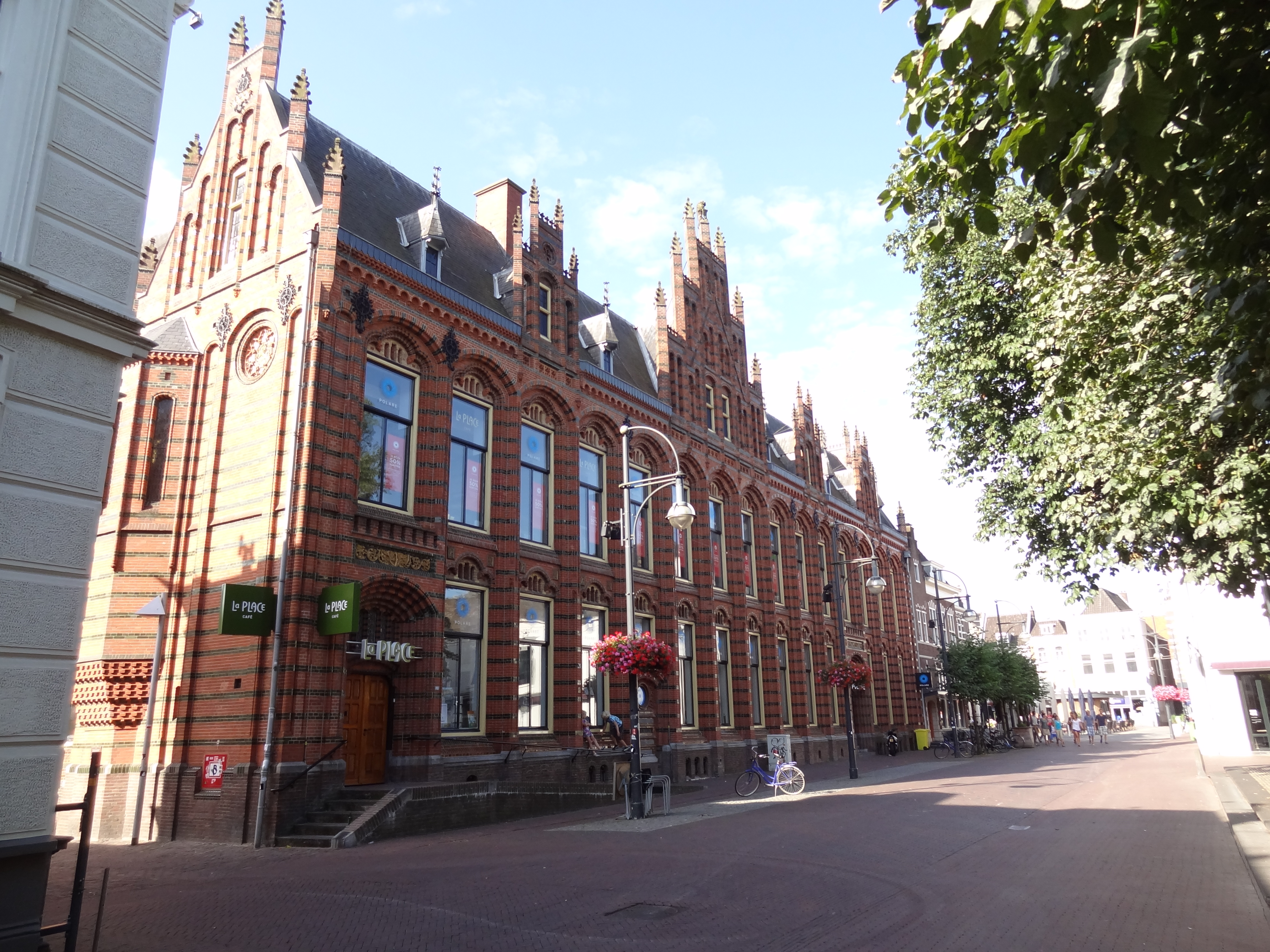 Voormalig postkantoor in Arnhem